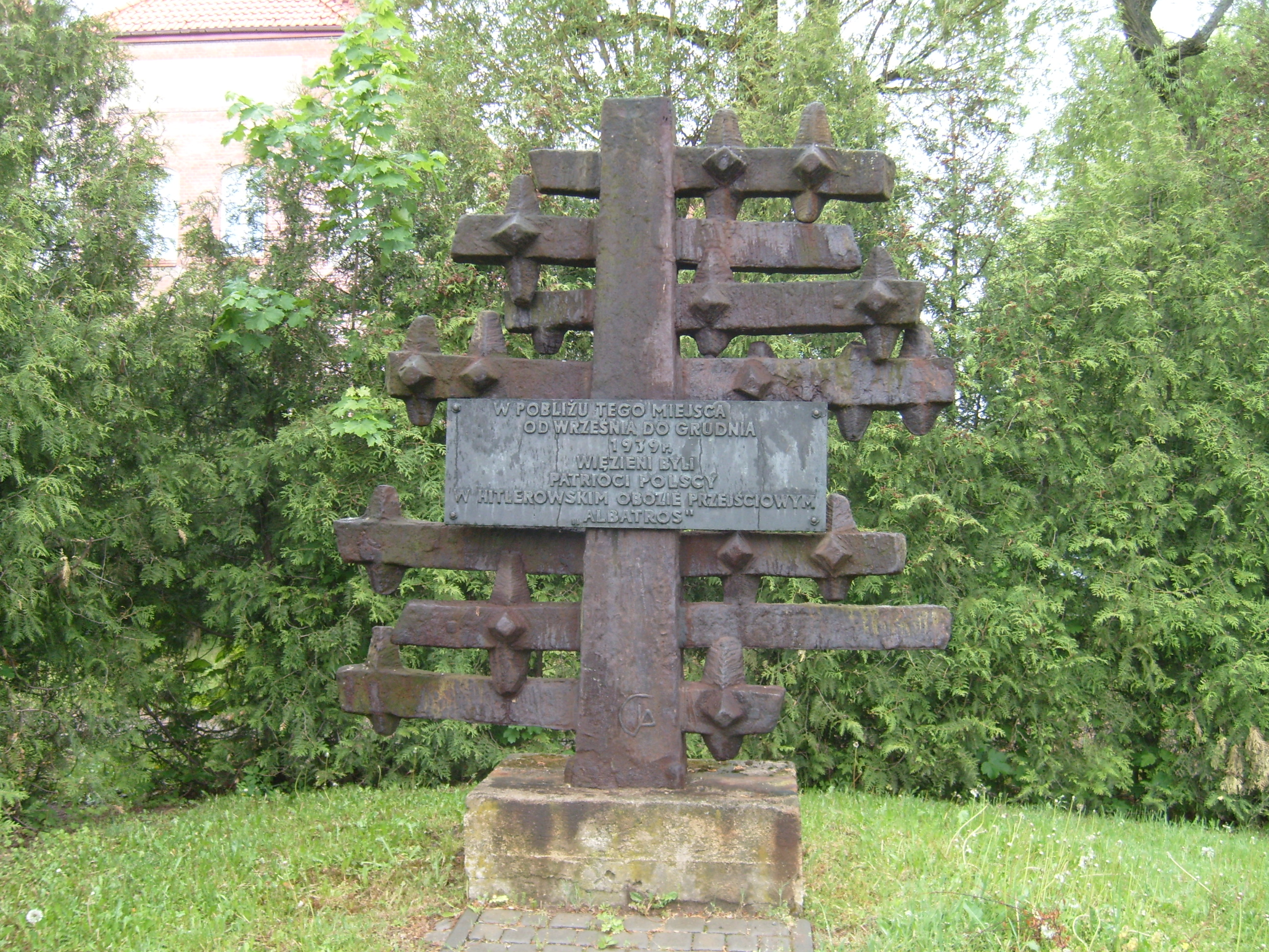 Pomnik upamiętniający niemiecki obóz przejściowy "Albatros" w Pile.